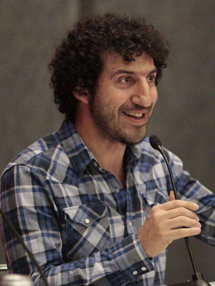 Una jornada más en la Feria Internacional del Libro de Guadalajara en la que el debate literario se ha alternado con la música, teatro y análisis de los retos de las ciudades. En este penúltimo día de la Feria del Libro de Guadalajara, el acento social lo pusieron Saskia Sassen -socióloga, escritora y profesora holandesa, Premio Príncipe de Asturias de Ciencias Sociales- y Marisol Mena, directora general de Intervención en el Paisaje Urbano y Patrimonio Cultural del Ayuntamiento, en una diálogo denominado La ciudad en su circunstancia: la construcción de la ciudad.